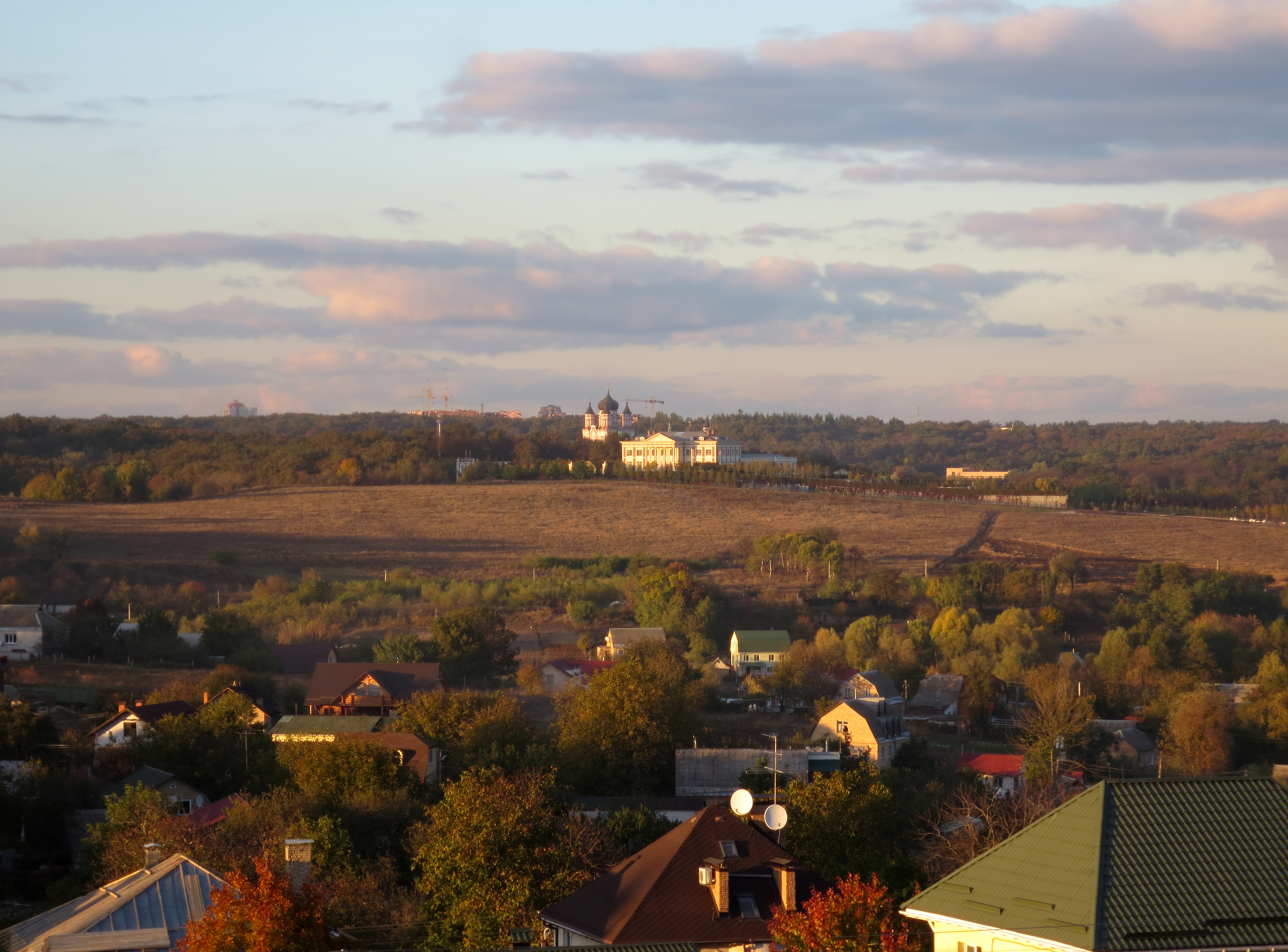 Хотівське городище (на задньому плані). Вид з півдня.